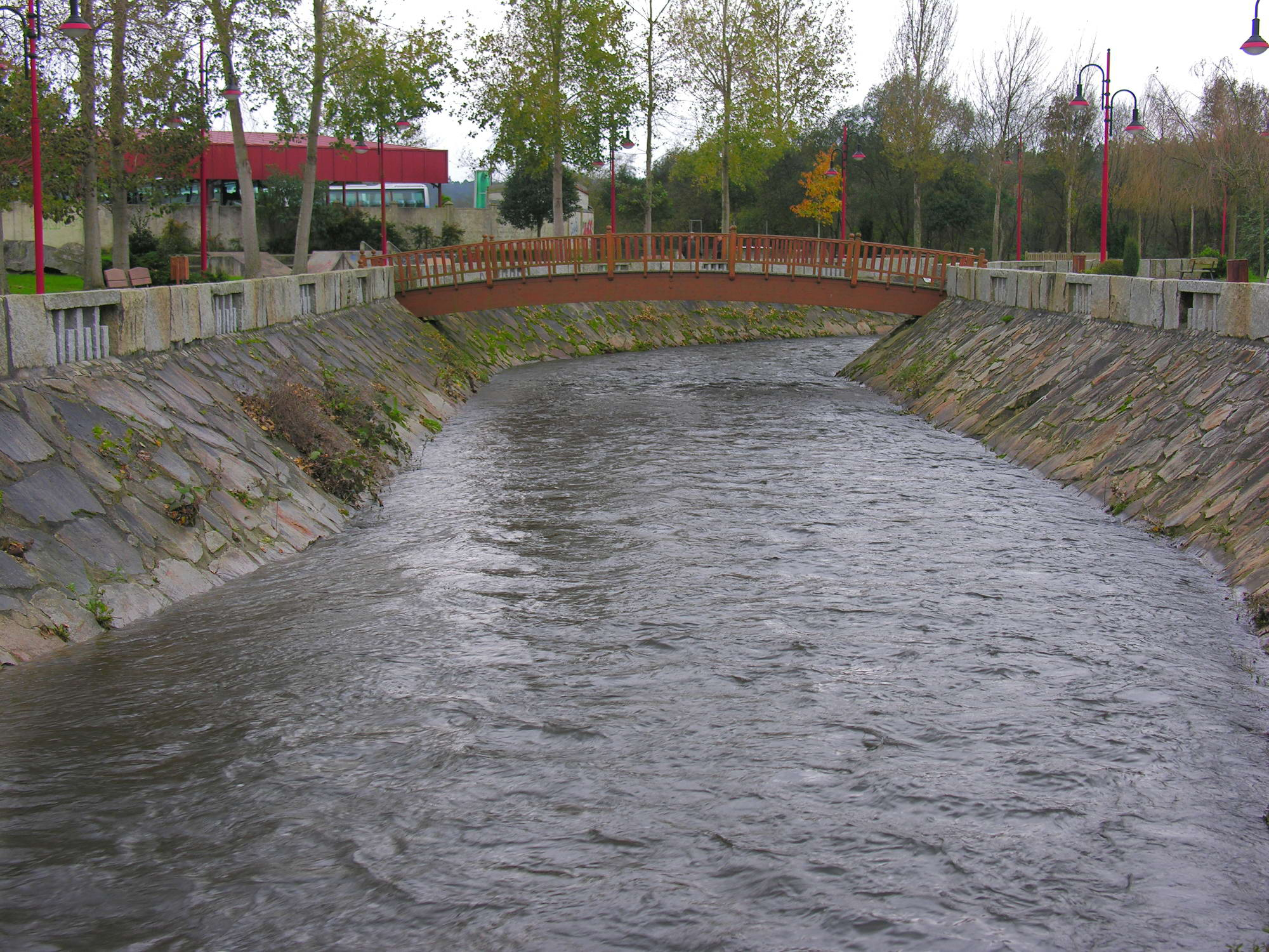 O parque do Anllóns, no centro da Vila de Carballo, Galiza Publish by= Luis Miguel Bugallo Sánchez.